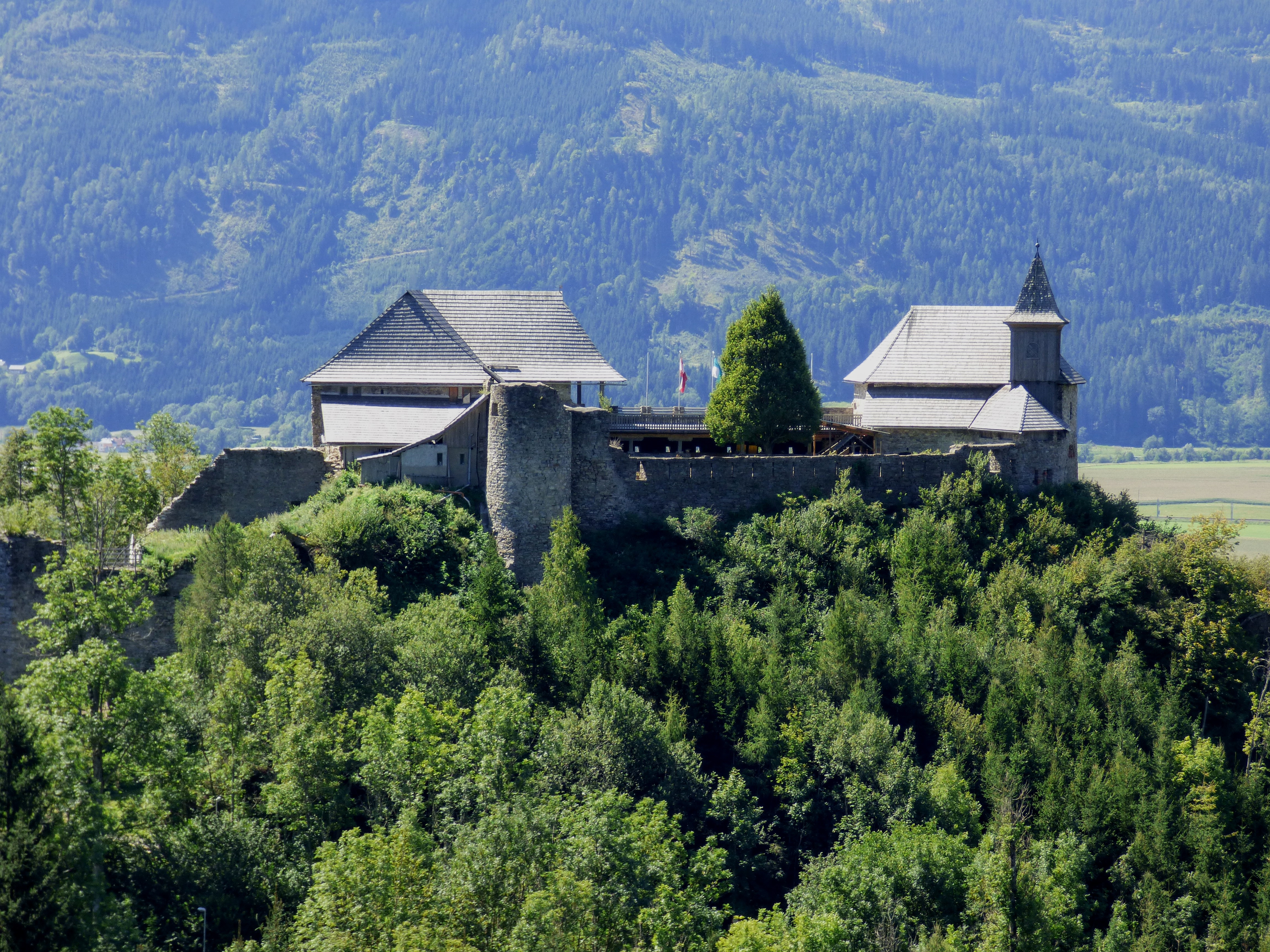 Burgruine Dürnstein, Steiermark.